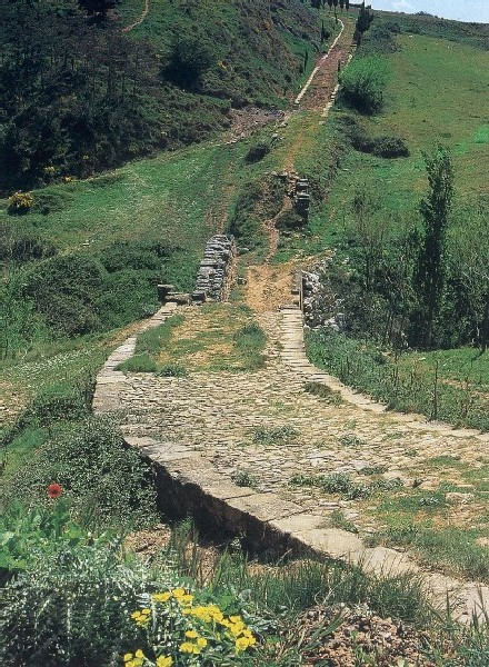 Date du cliché : septembre 2001.